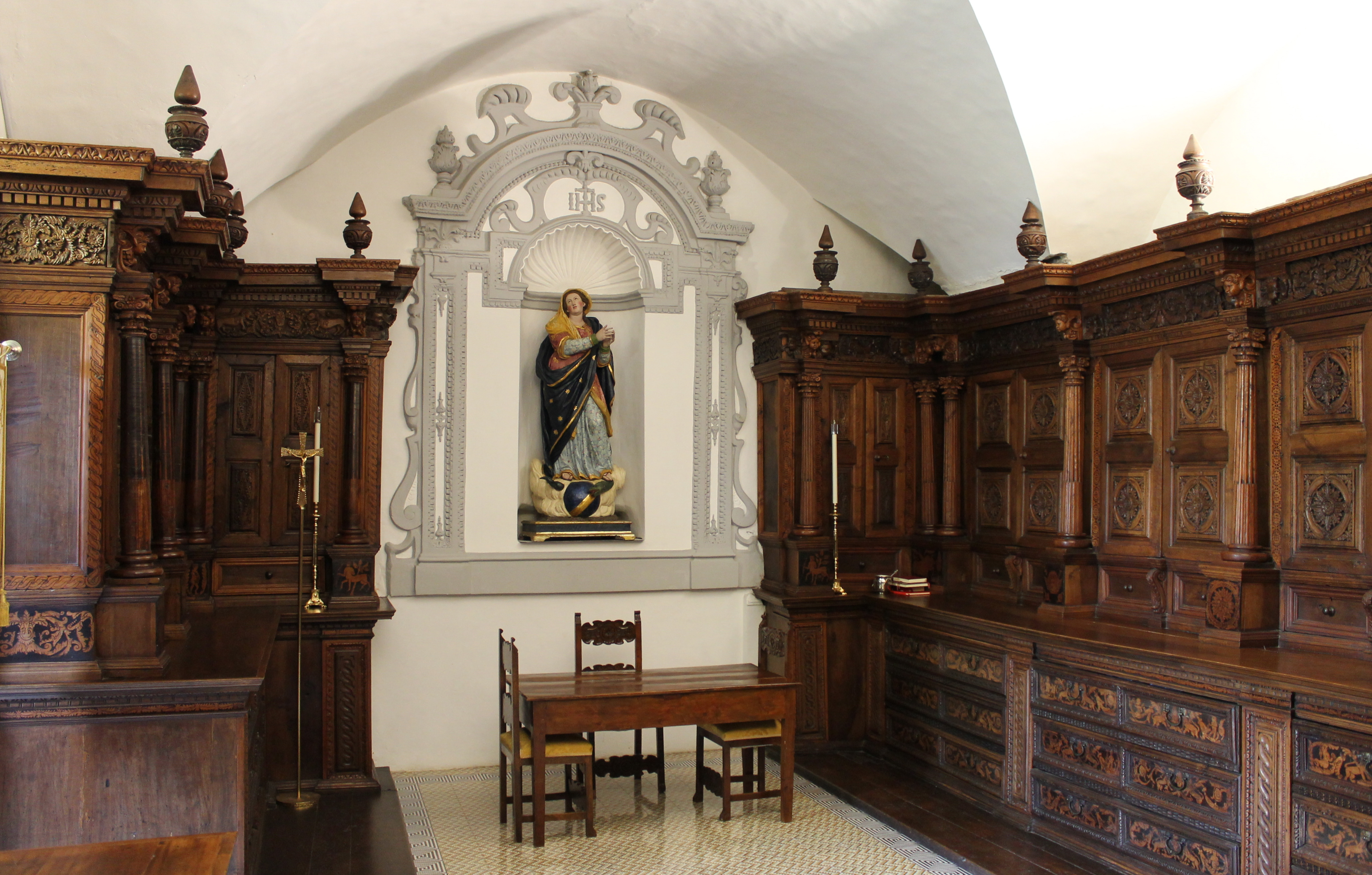 Sacrestia del Convento della SS. Trinità di Baronissi